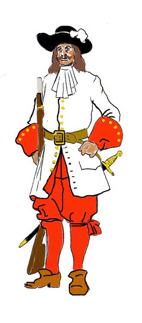 fantassin du régiment de Picardie en 1672